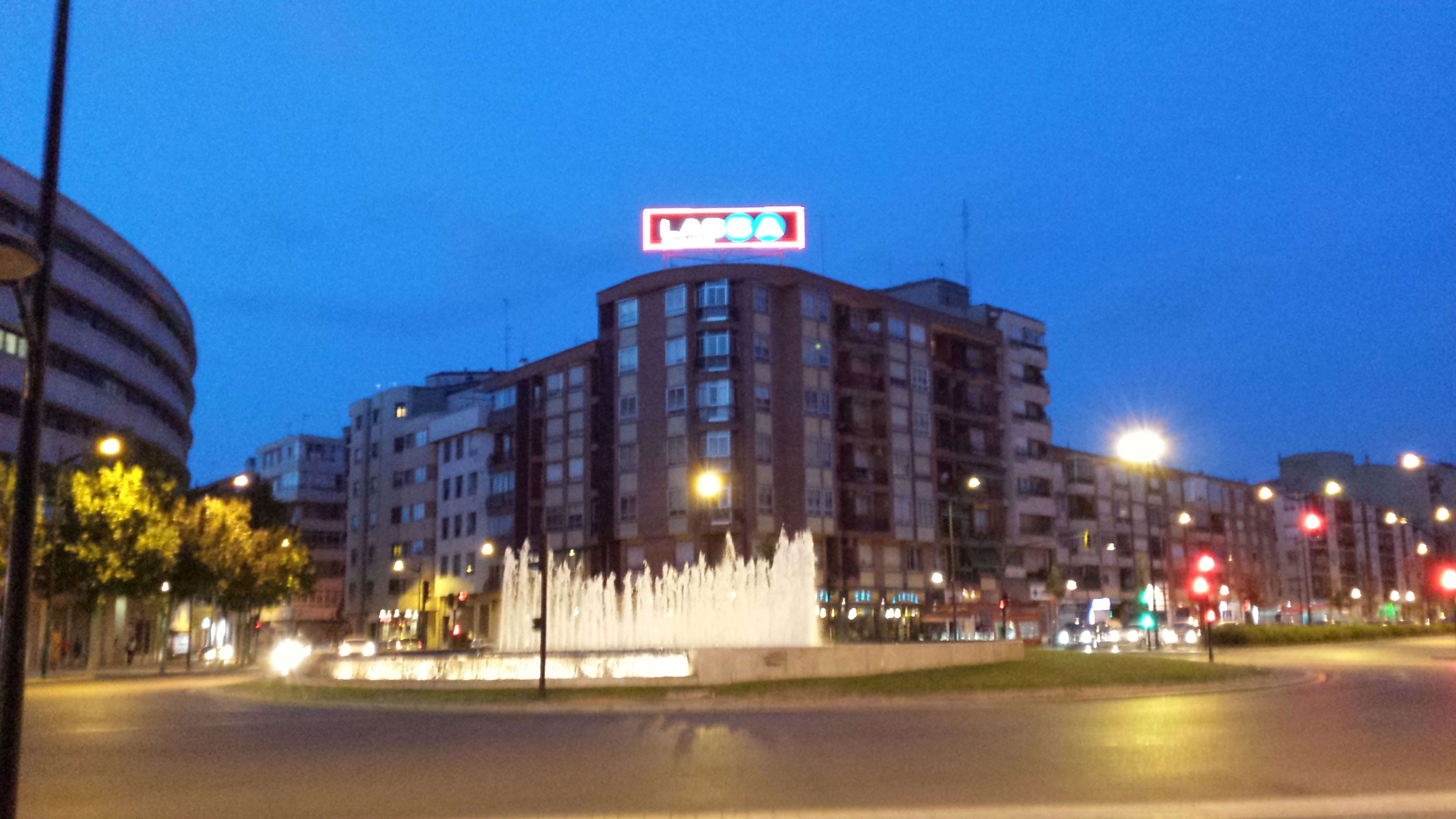 Fuente de la Circunvalación. Letrero de Neumáticos Lassa. Circunvalación de Albacete. Carretera de las Peñas